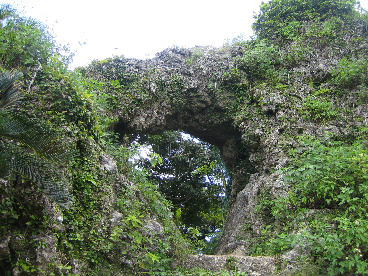 ( Description 玉城門跡 (Tamagusuku Castle, Nanjo, Okinawa, Japan) Date2008/7/1撮影SourcePhoto by User:MocchyAuthorMocchyPermission (Reusing this file) 本人撮影。 ) 玉城門跡 (Tamagusuku Castle, Nanjo, Okinawa, Japan)